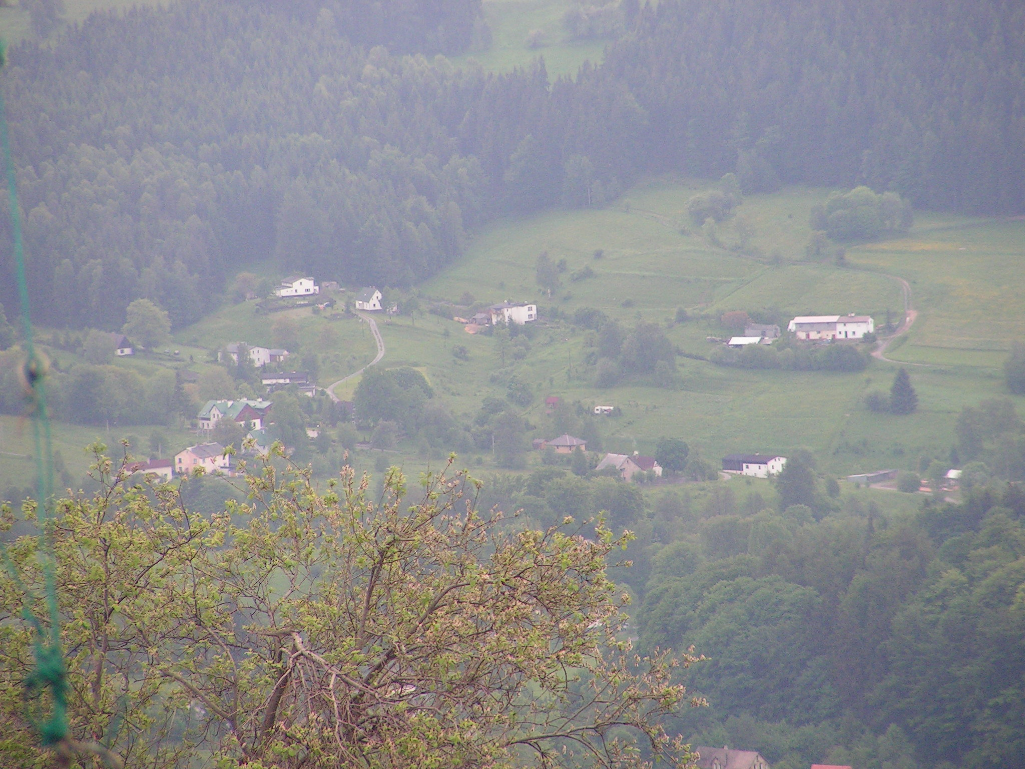 Sokolec widziany ze schroniska Orzeł